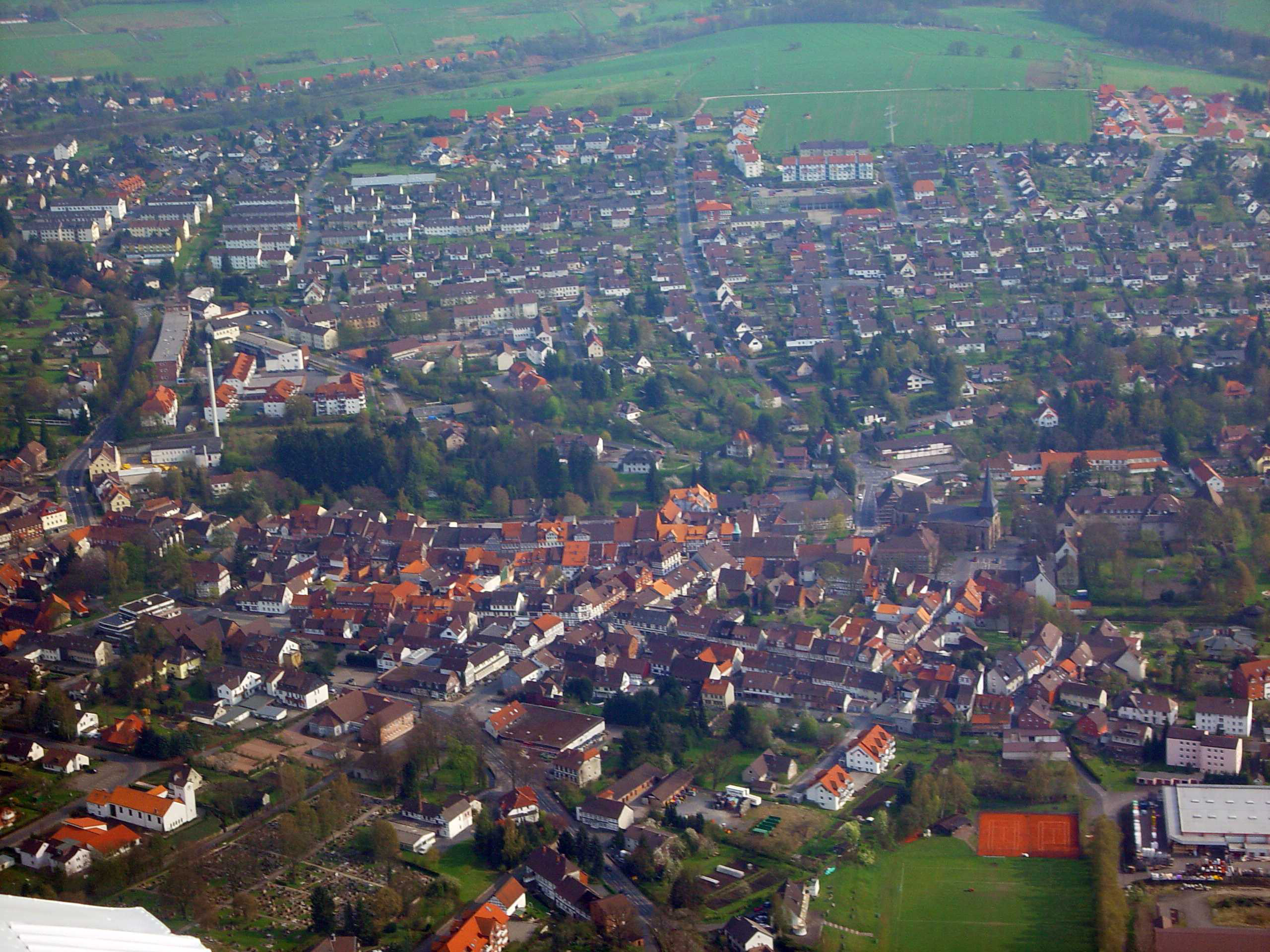 Luftaufnahme der Uslarer Kernstadt